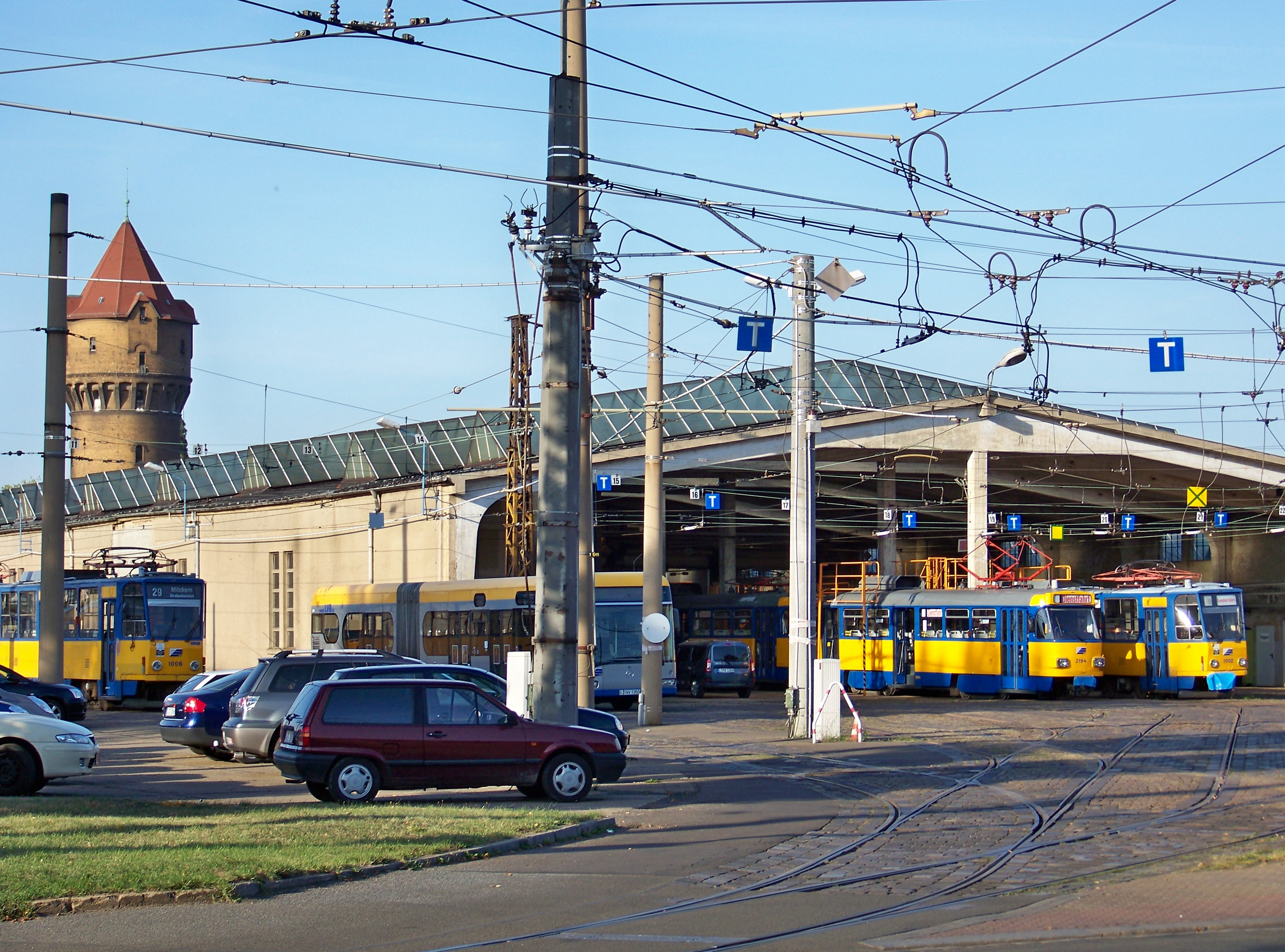 Straßenbahnhof Paunsdorf in Leipzig